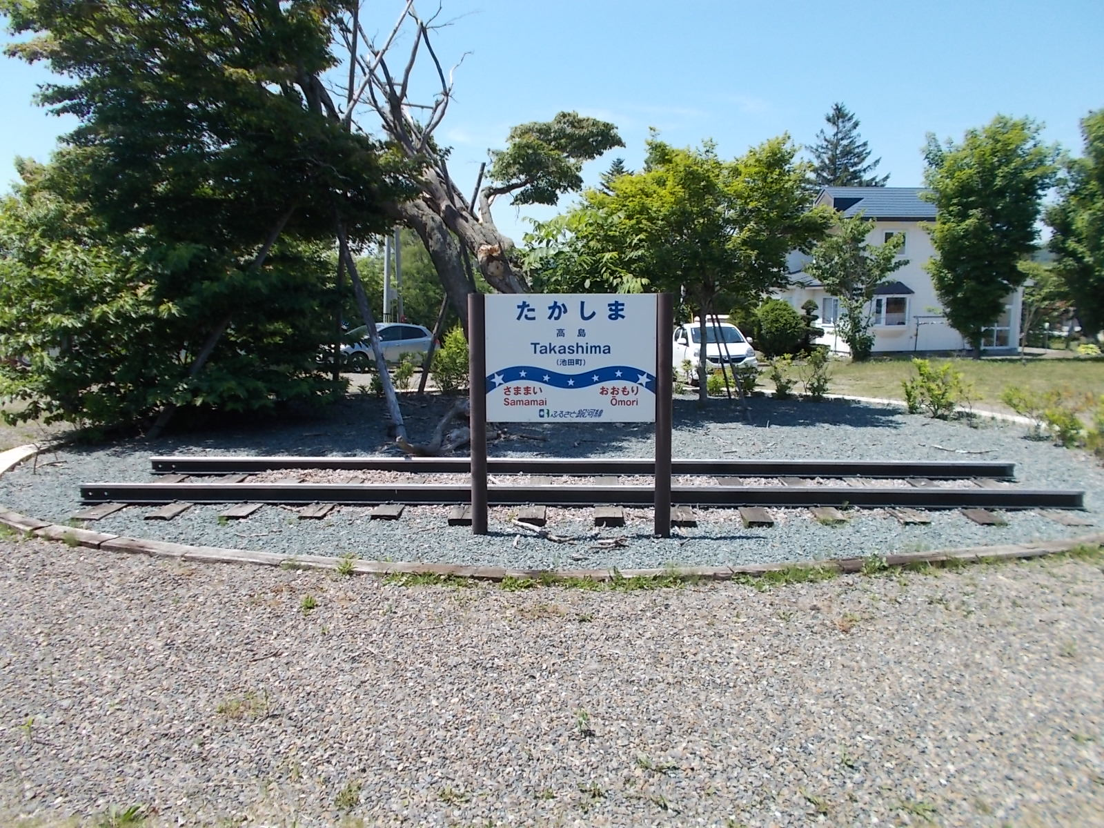 駅舎側ホーム跡より。ふるさと銀河線仕様の駅名票とレールが見える。